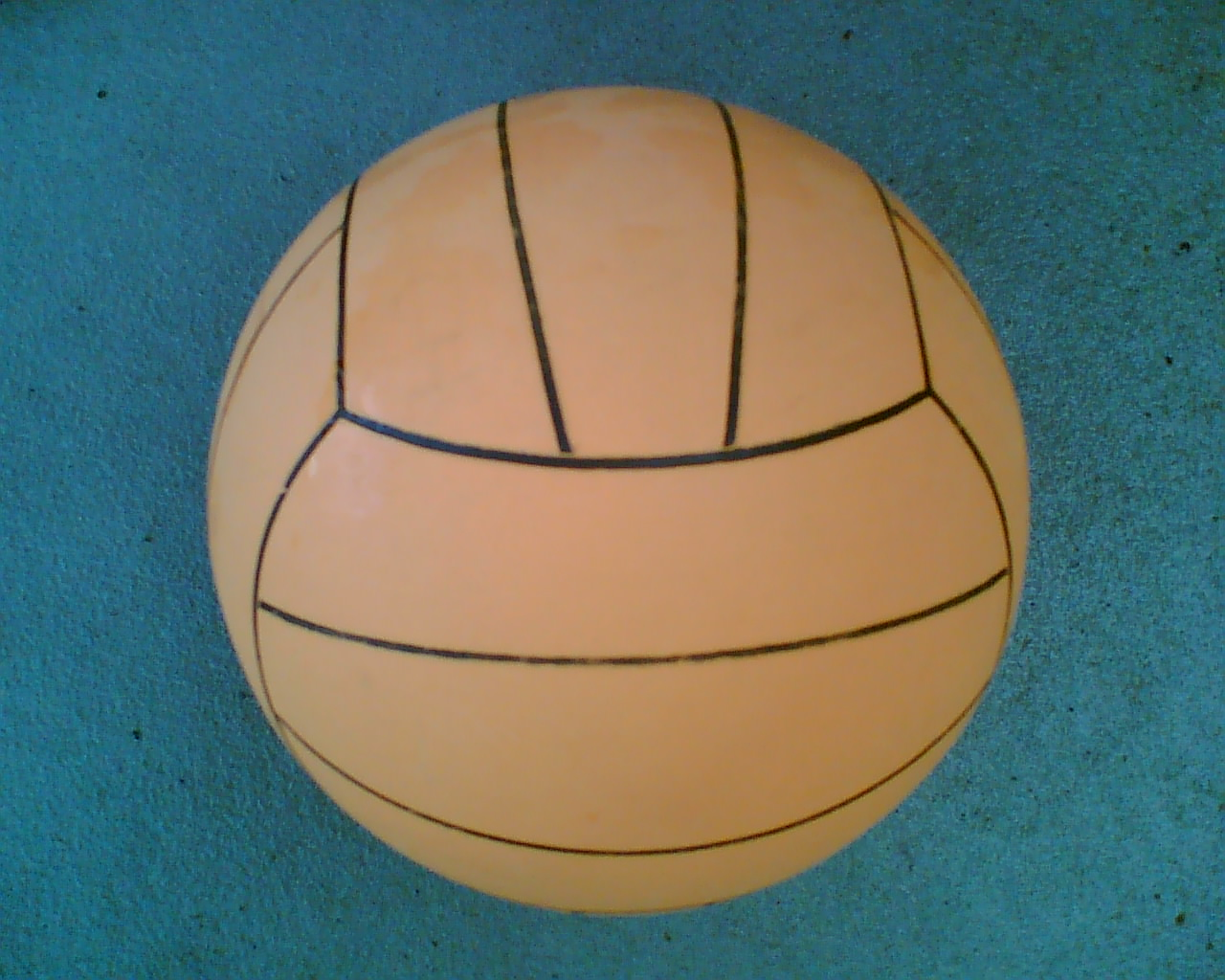 Selbst geknippst. GNU FDL. 1280 x 1024. 297 KB.